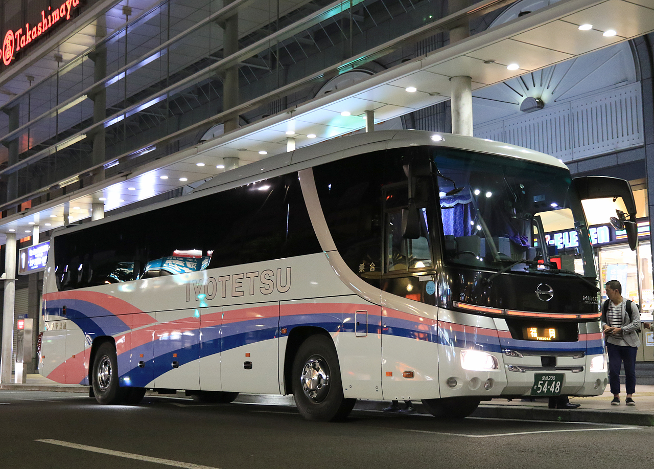 登録番号 愛媛200か53-88 社番：5448 伊予鉄道㈱松山室町営業所（八幡浜）所属 夜行高速路線用車両 2016年5月14日 伊予鉄松山市駅にて撮影